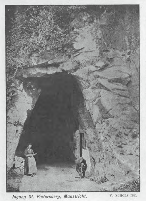 Mussenberg van voor 1905 met grotwoning, Gangenstelsel Slavante, Sint-Pietersberg, Maastricht, Nederland